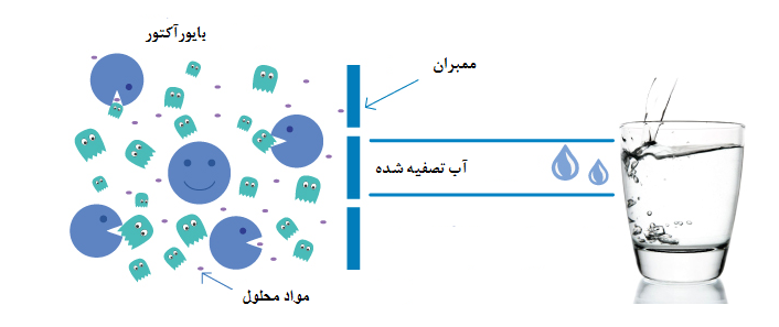 در این تصویر عملکرد یک ممبران را میبینید